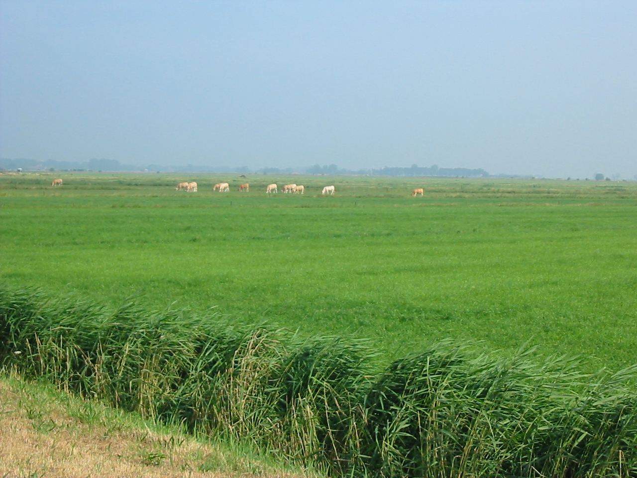 Uitzicht over de Eemvallei. Zelfgemaakte foto (2006-07-07).